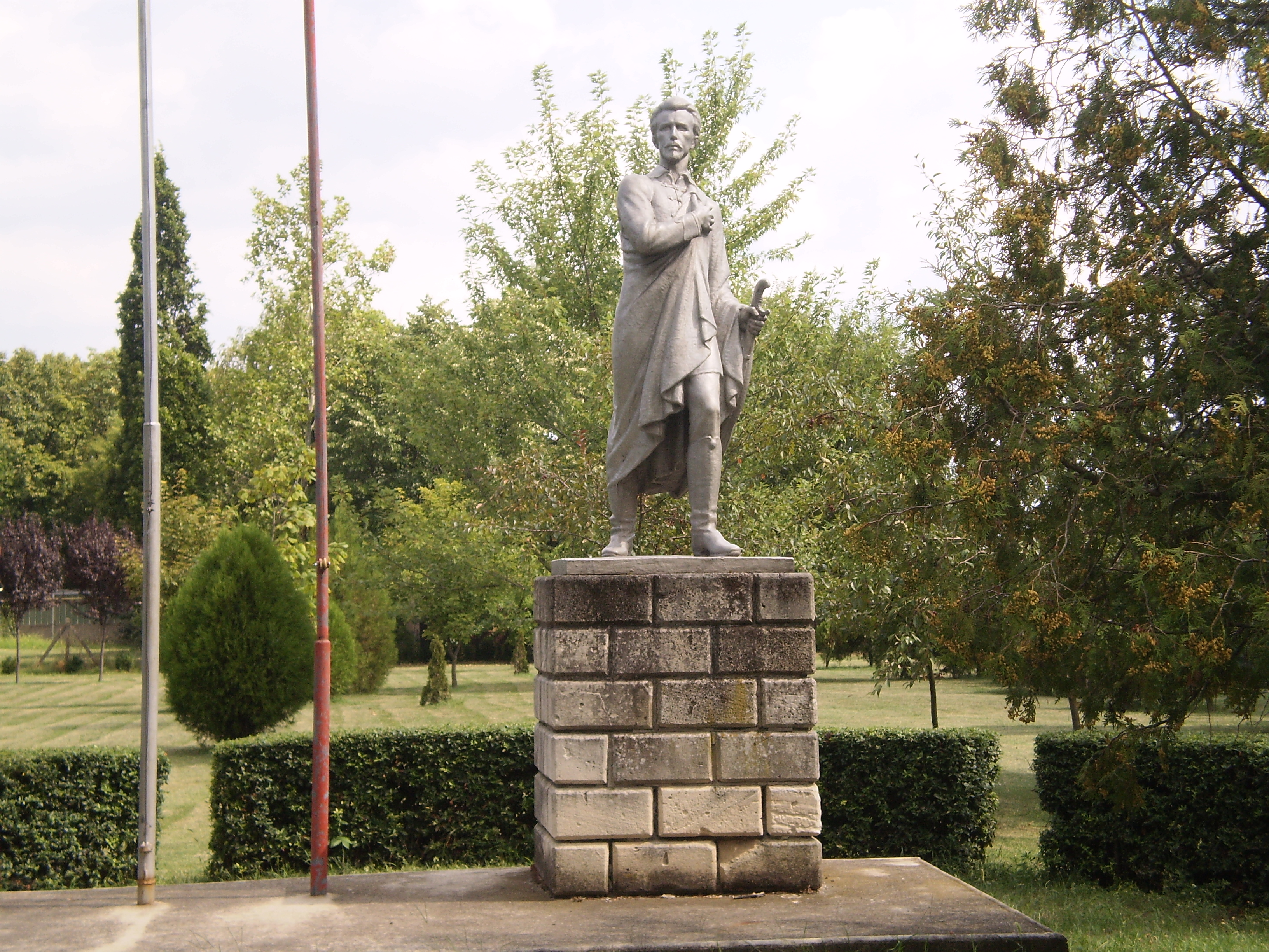 Petőfi Sándor szobra Nagymágocson, Magyarország